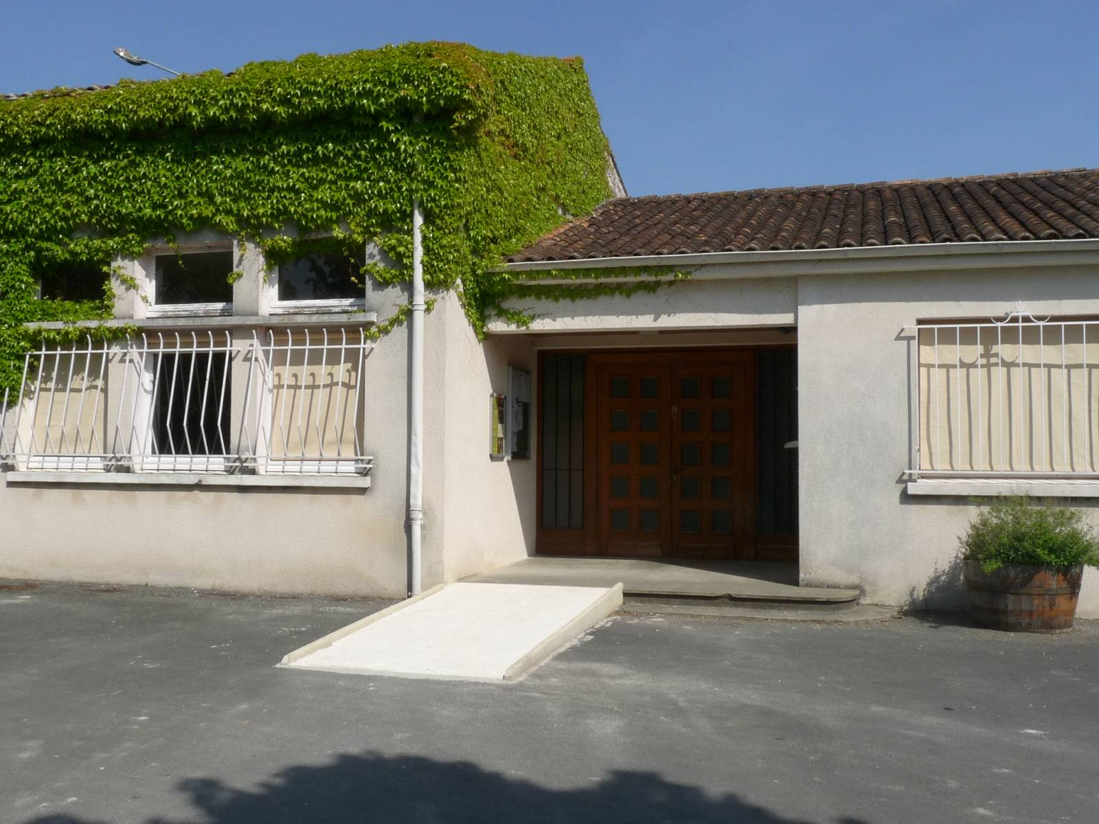 mairie de Louzac-St-André à Louzac, Charente, France